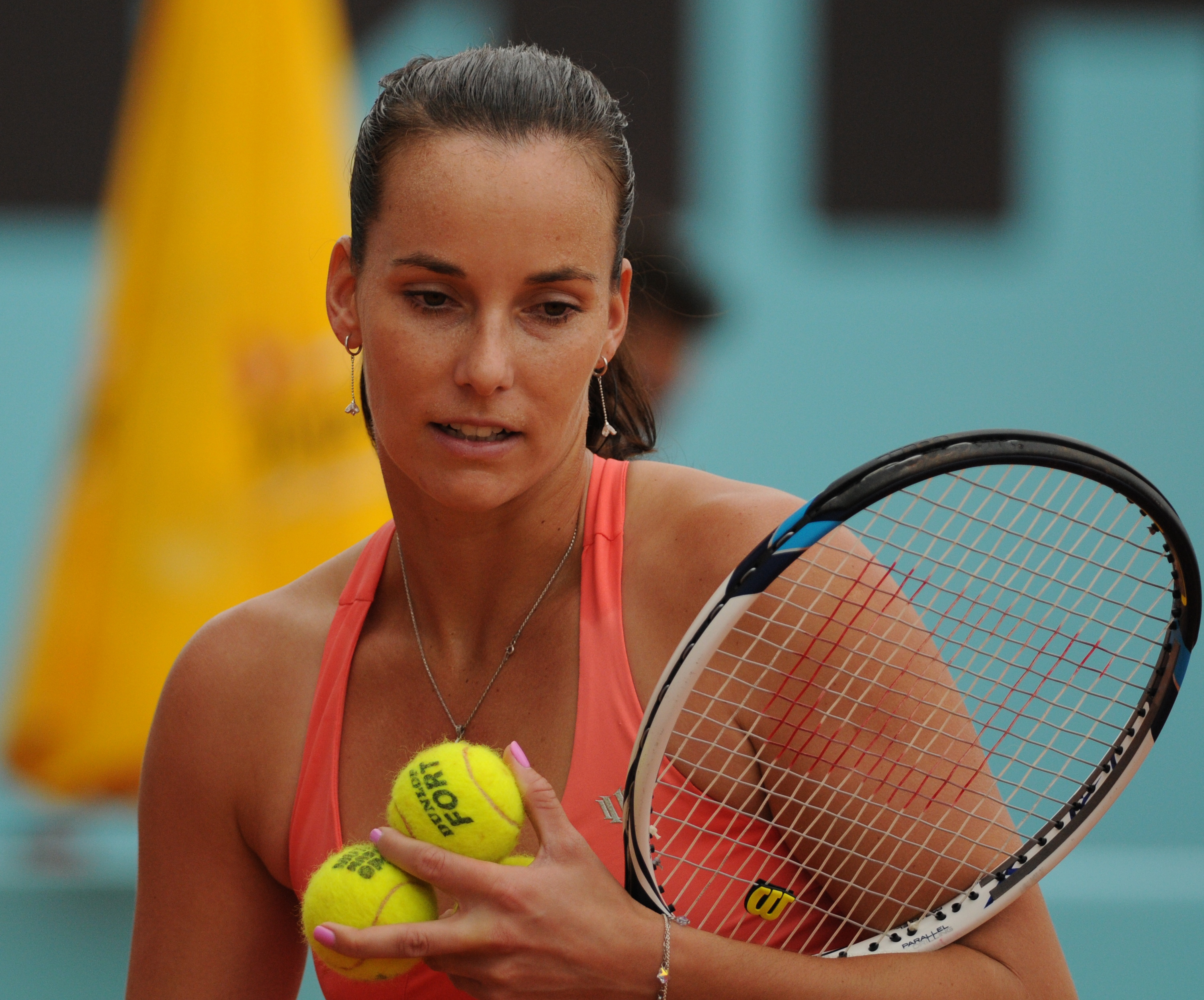 Jarmila Gajdosova